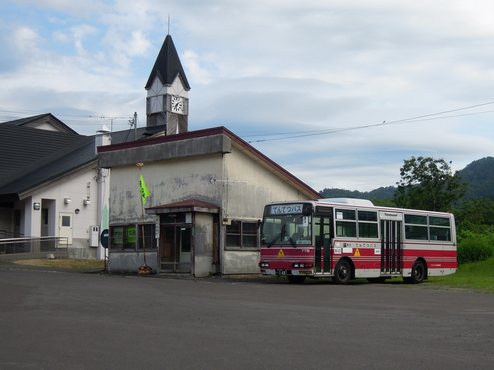 てんてつバス達布営業所